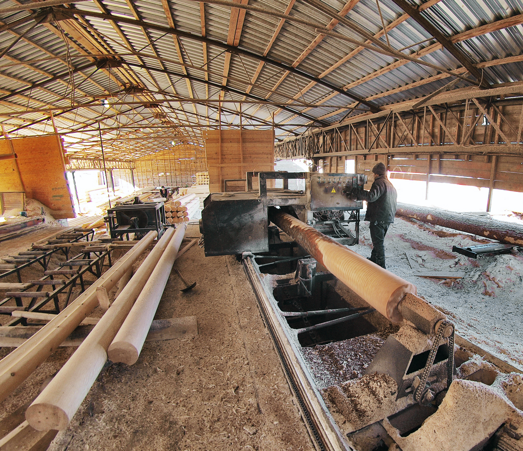 Производство оцилиндрованного бревна